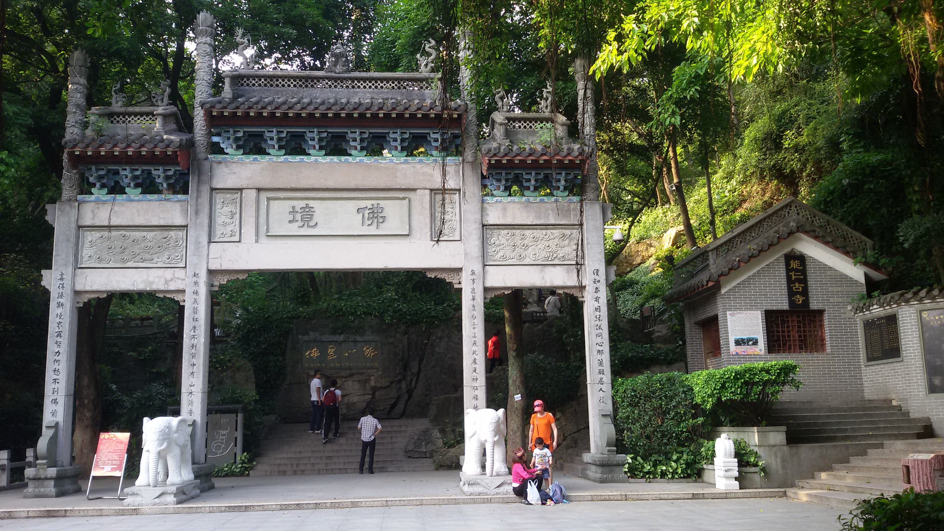 粵語: 能仁寺嘅正门牌坊